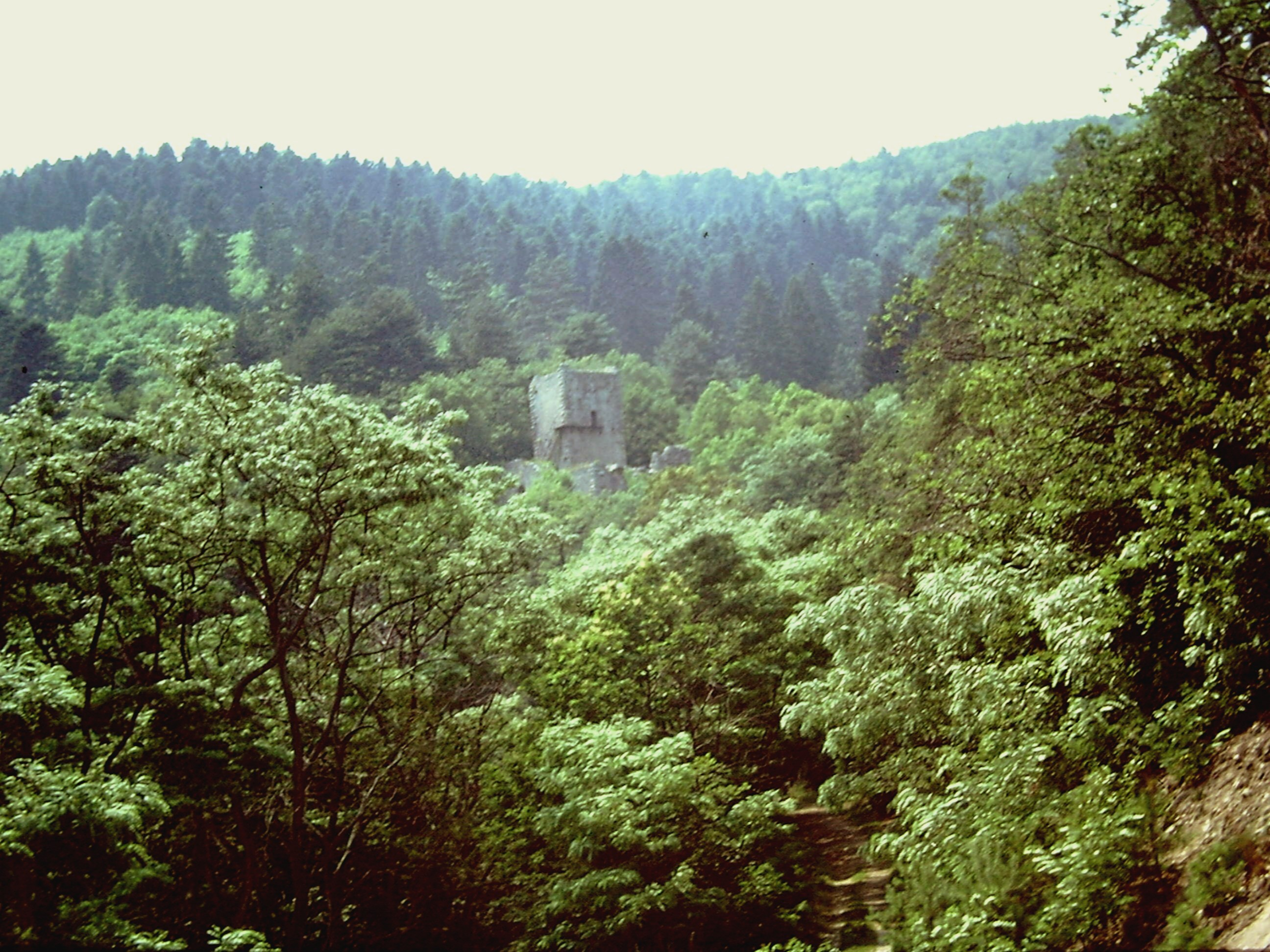 Château de Hagueneck